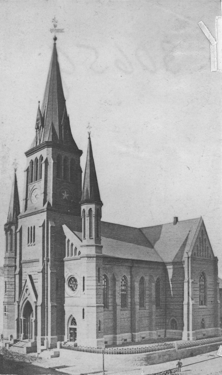 Johannes kirke var en tidligere kirke i Oslo. Kirken ble bygget i 1875 og nedlagt og revet i 1930.